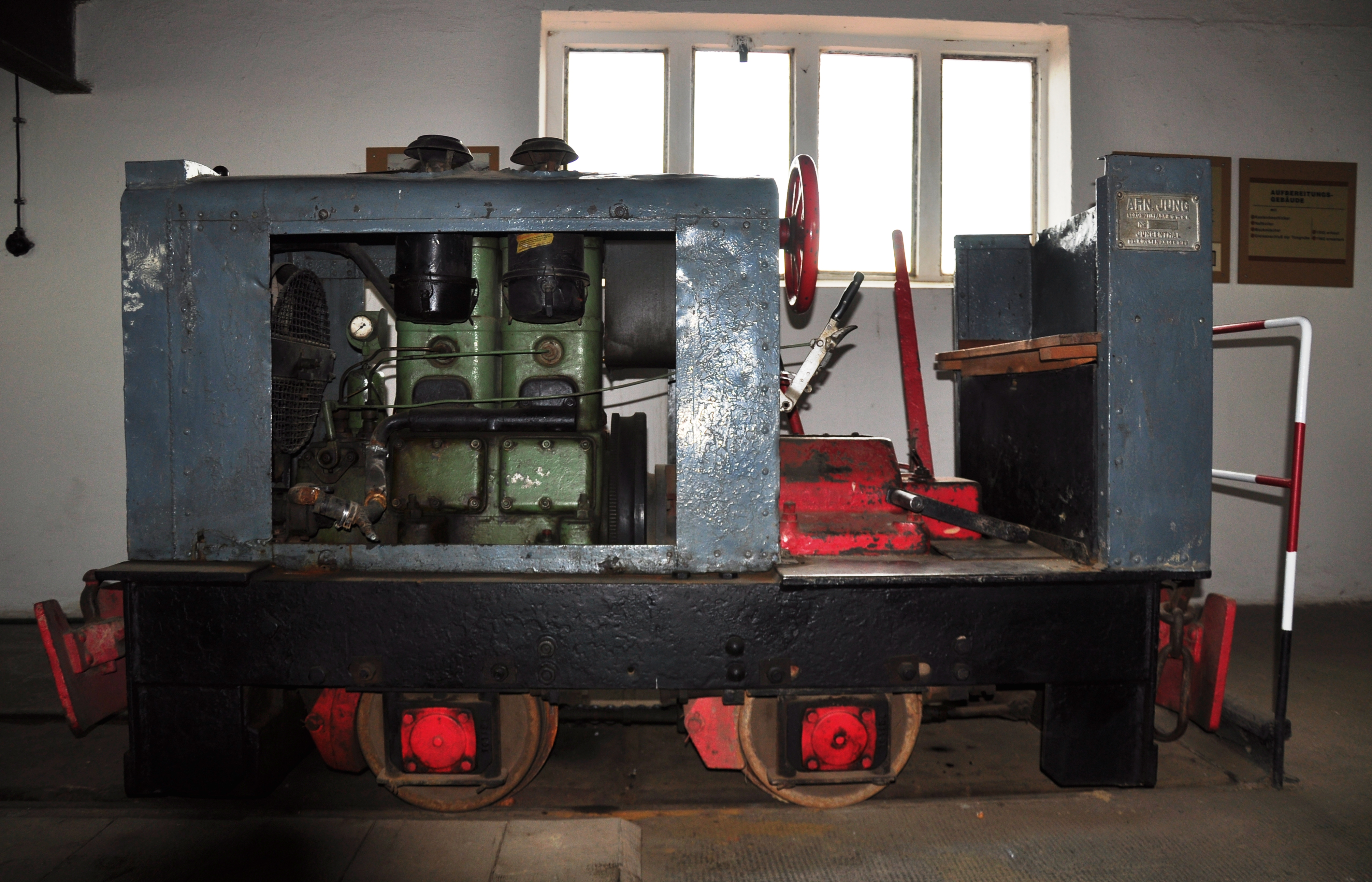 Ziegelei Hundisburg, Lokomotive: Arnold Jung Lokomotivfabrik GmbH, Jungenthal bei Kirchen an der Sieg